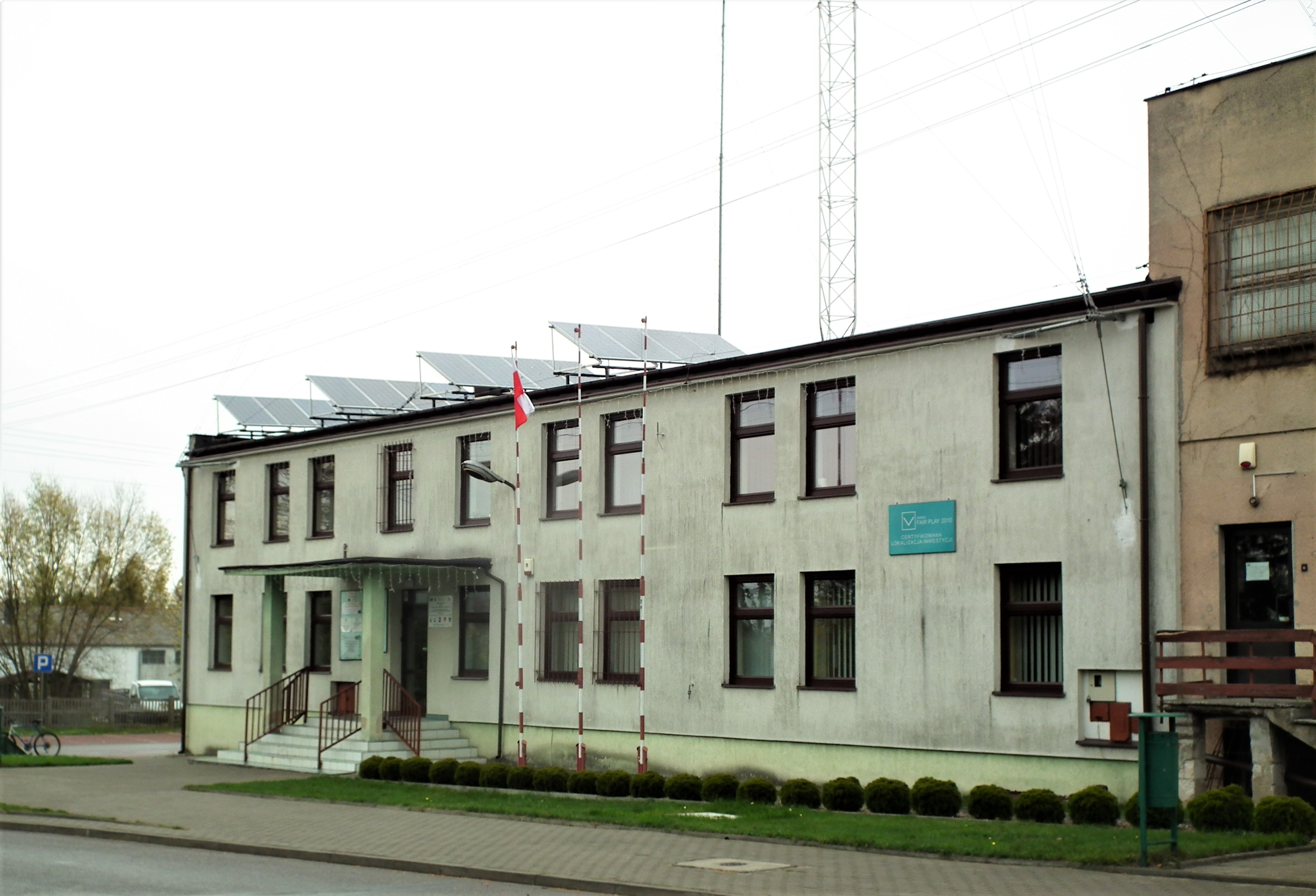 Dalików.